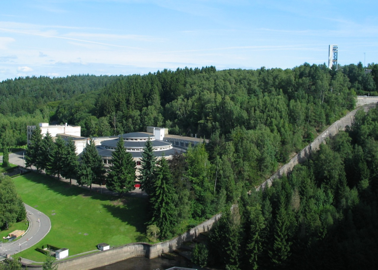 Station d' épuration du Barrage de la vesdre